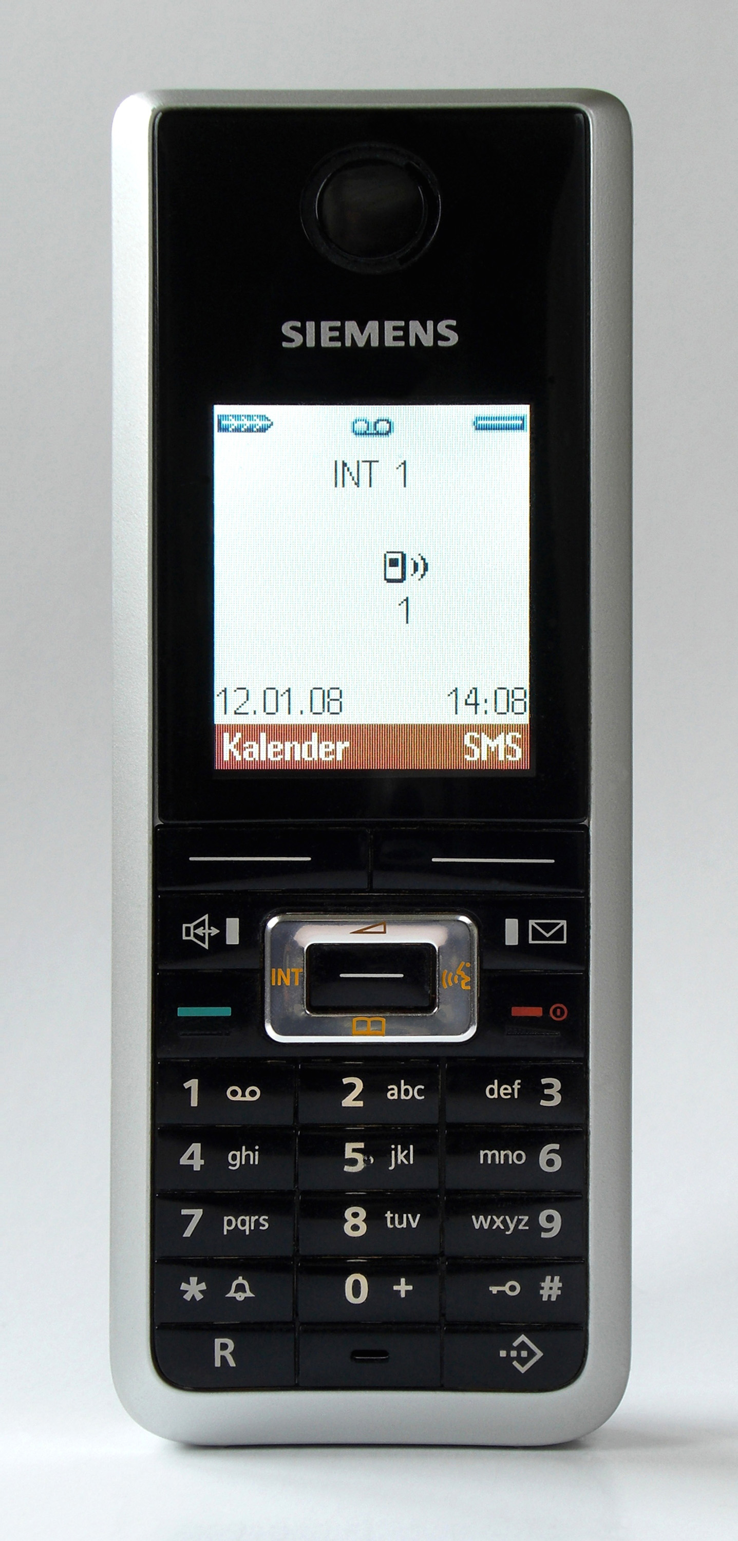 DECT Telephone Siemens Gigaset SL565